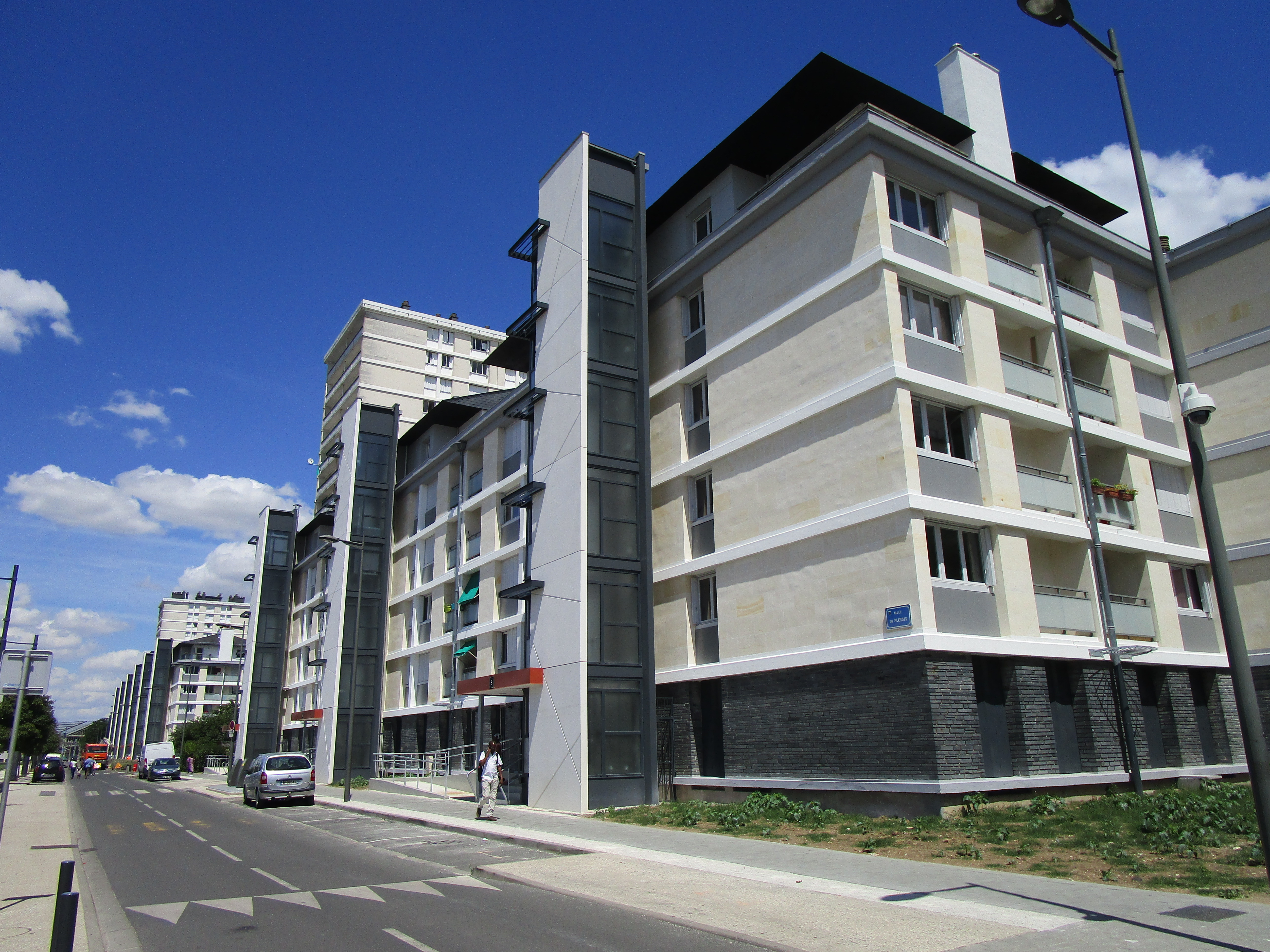 Vue d'une partie du lot des 811 dans le quartier du Sanitas, à Tours, sur l'allée du Plessis.